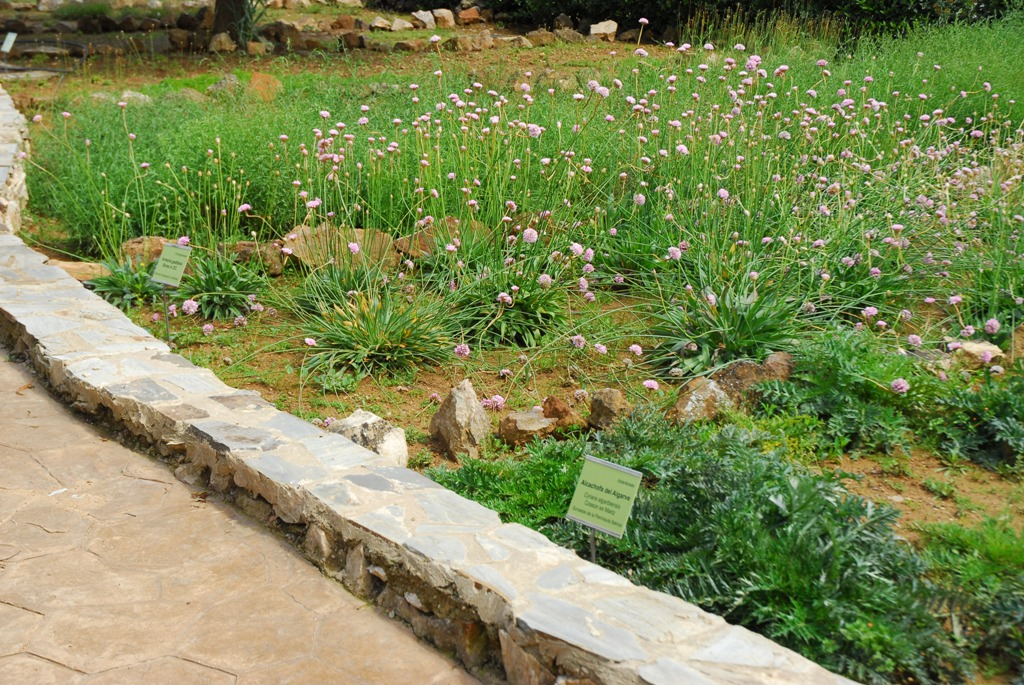 Colecciones de Flora endémica y amenazada en el Jardín Botánico El Robledo